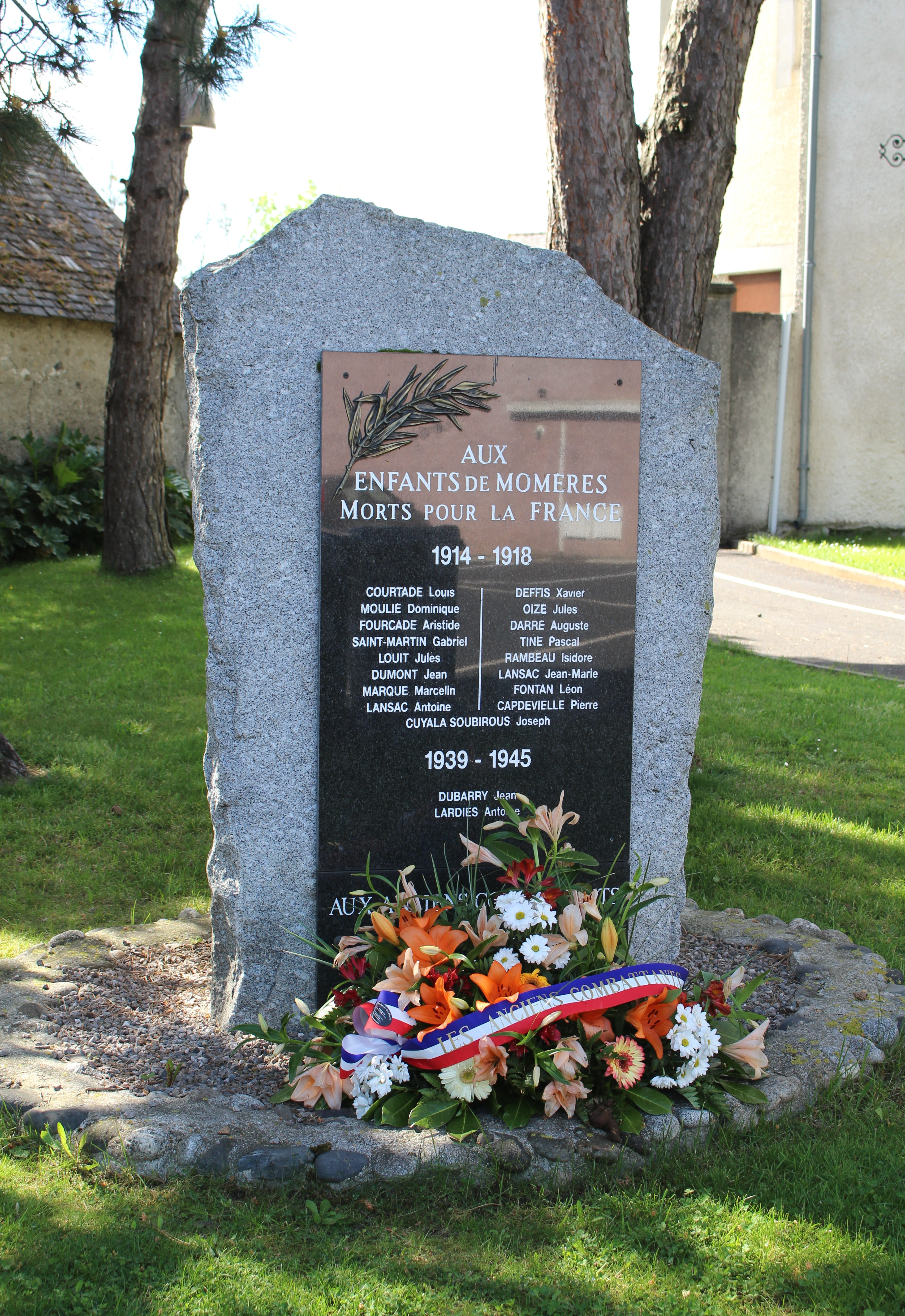 Monument aux morts de Momères (Hautes-Pyrénées)